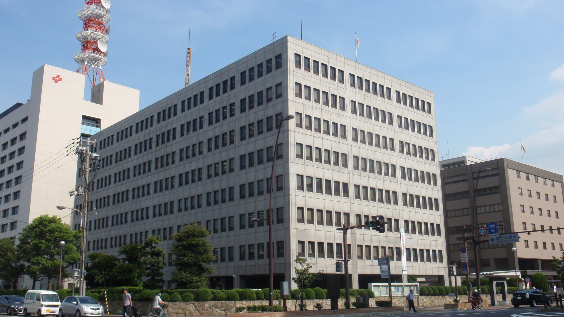 香川県高松市丸の内にある高松法務合同庁舎。高松高等検察庁、高松地方検察庁、高松区検察庁、高松法務局、矯正研修所高松支所、高松矯正管区、四国地方更生保護委員会、高松保護観察所、高松入国管理局が入居している。